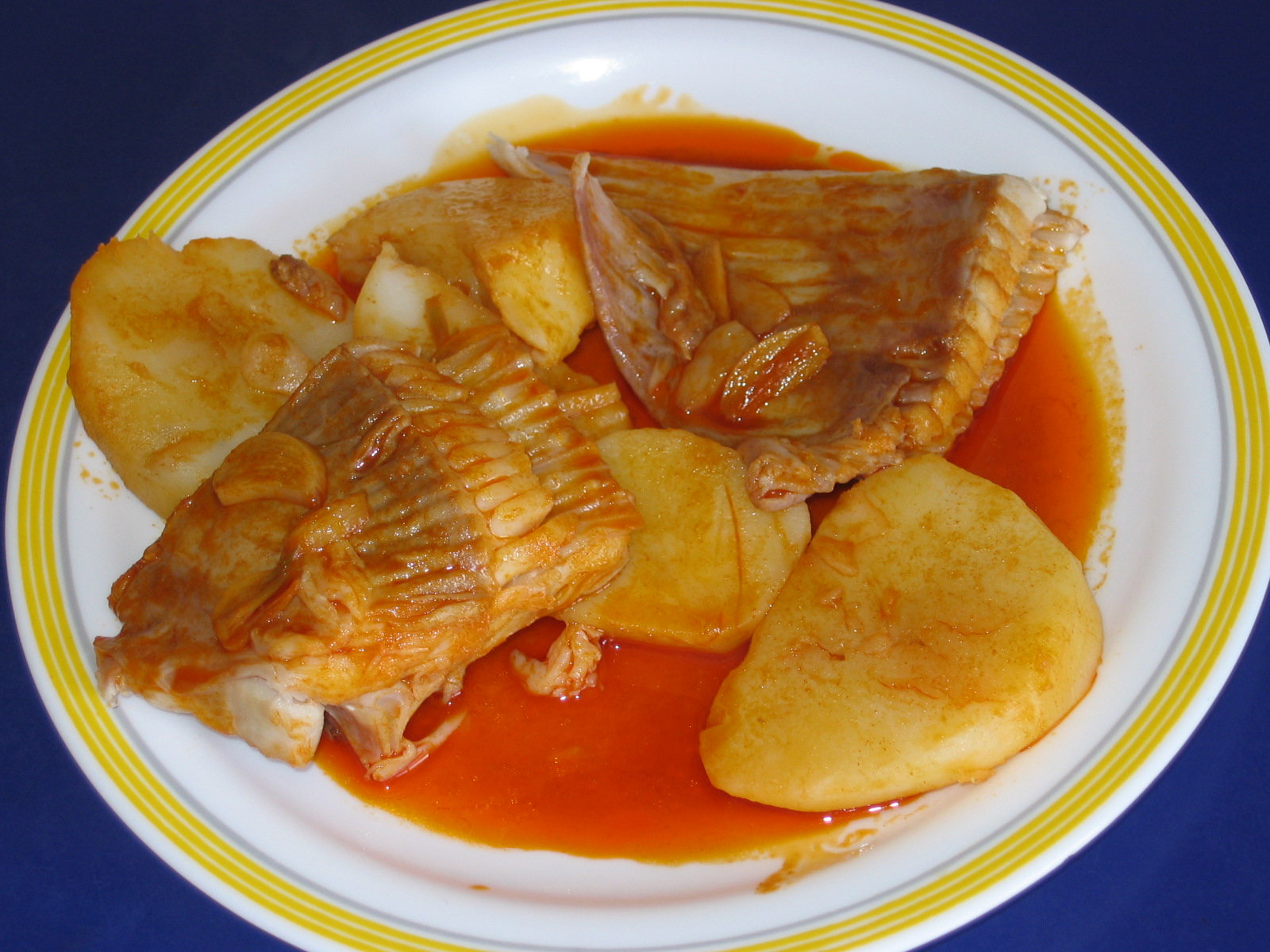 Caldeirada de raia